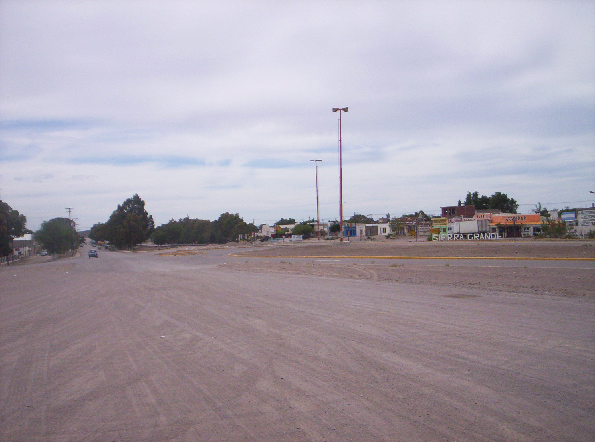 cartel de entrada de la localidad desde laruta